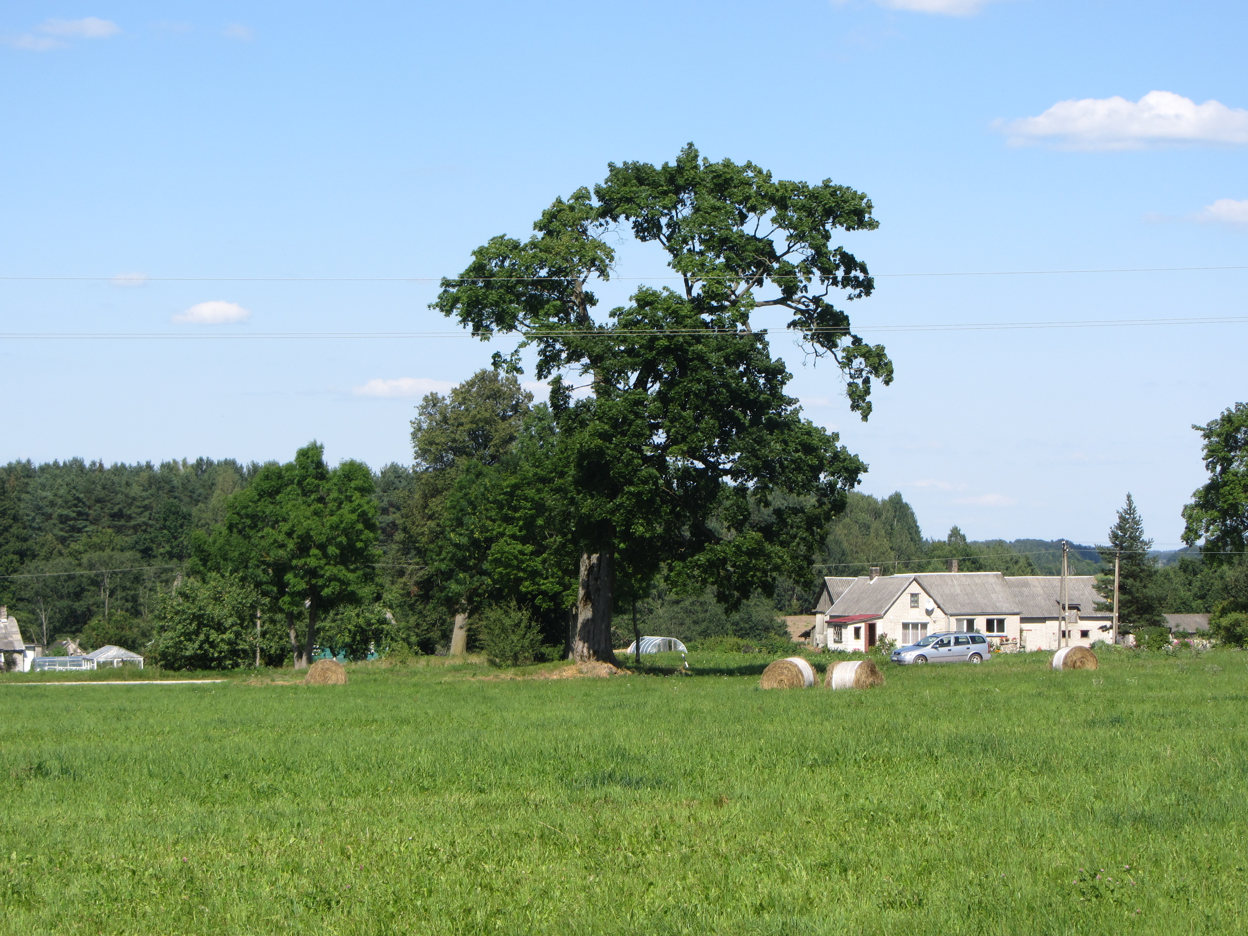 Širvintos, Lithuania